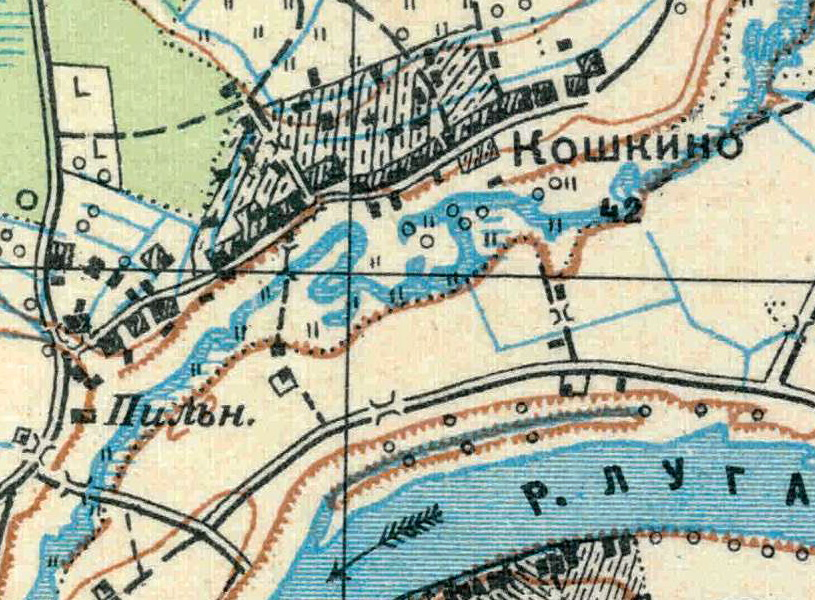 Топографическая карта Ленинградской области, квадрат О-35-21-Г-б (Калмотка), деревня Кошкино.